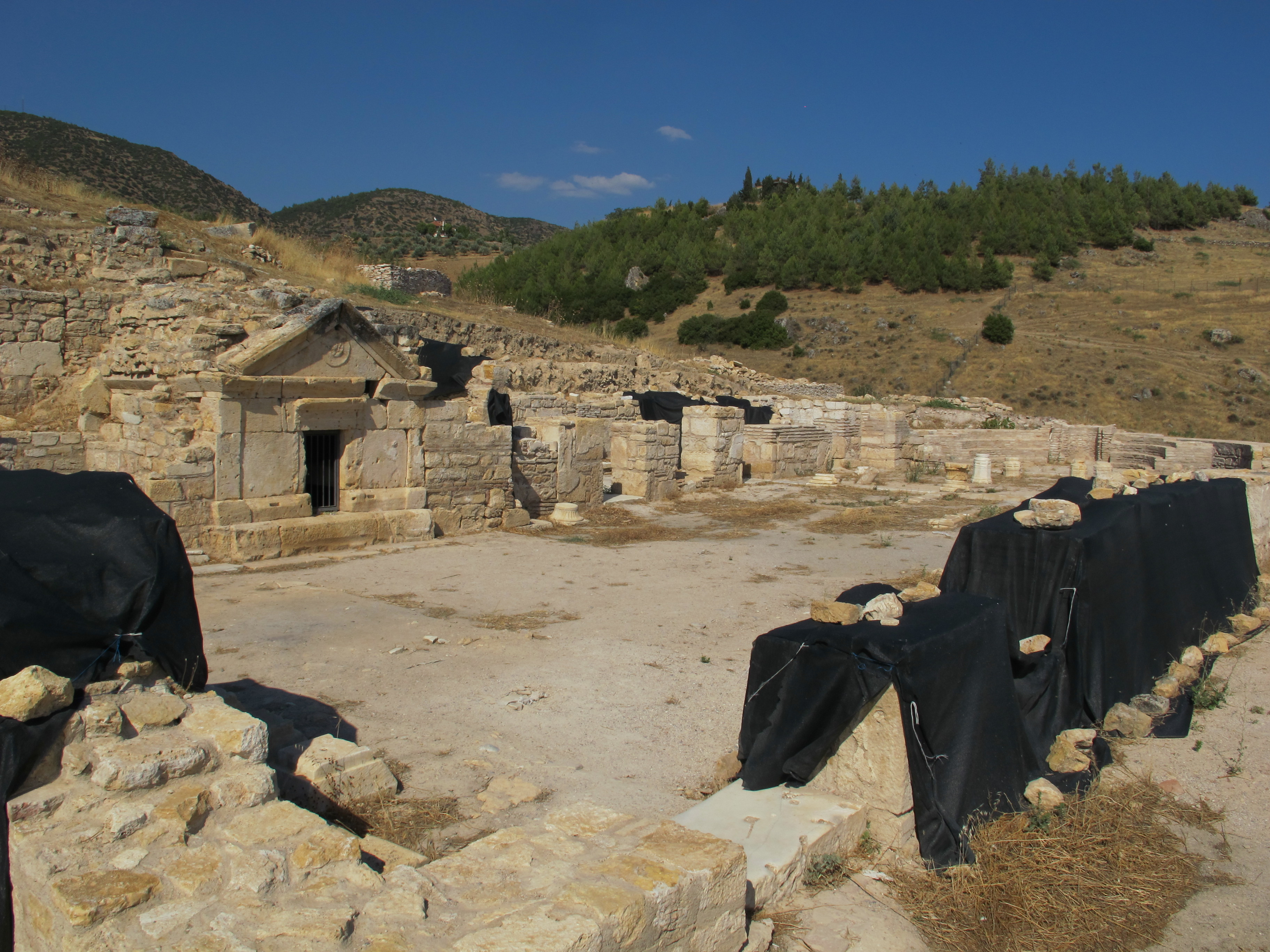 Hyerapolis, martyrion di san filippo, annessi